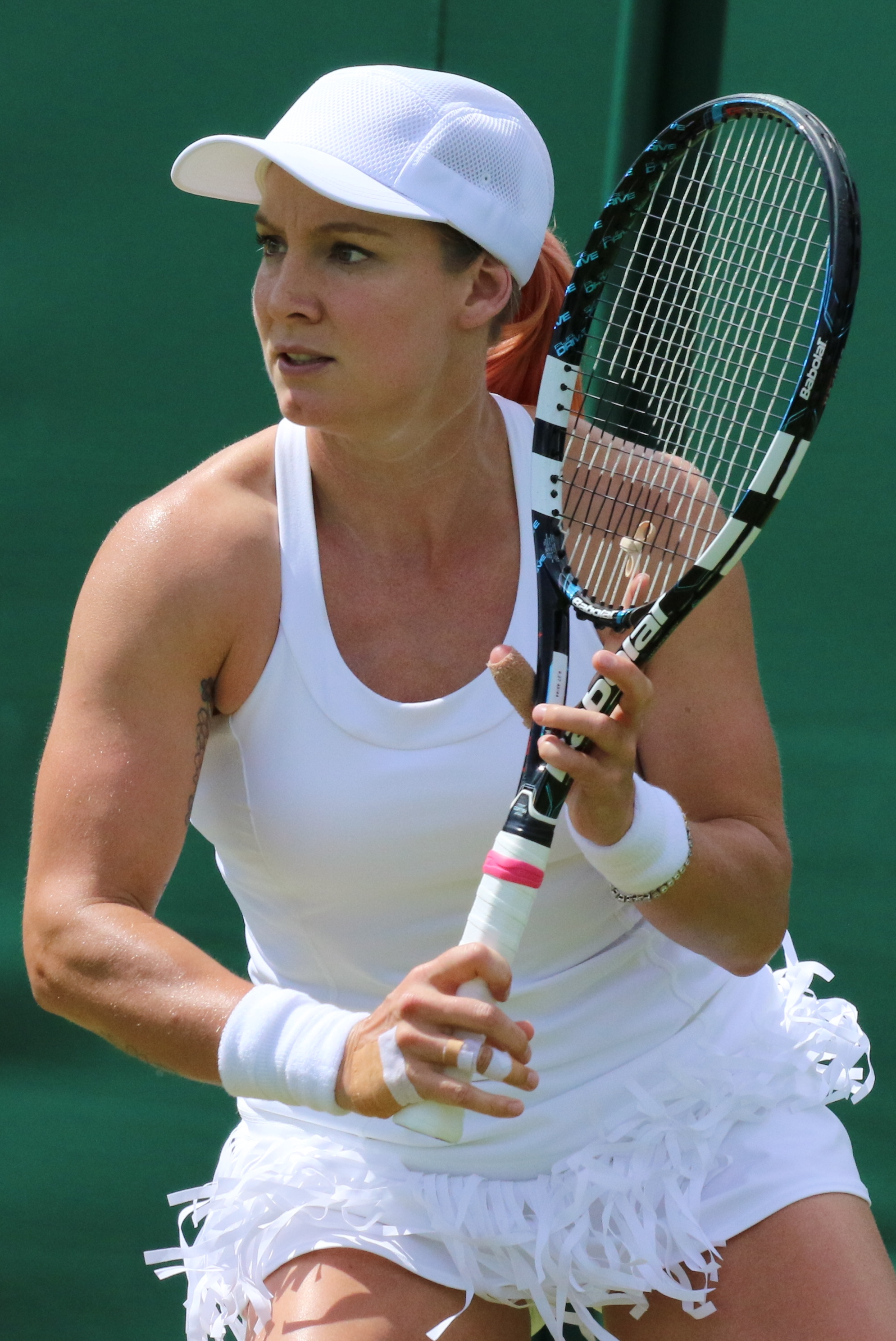 Mattek Sands WM16 (4)